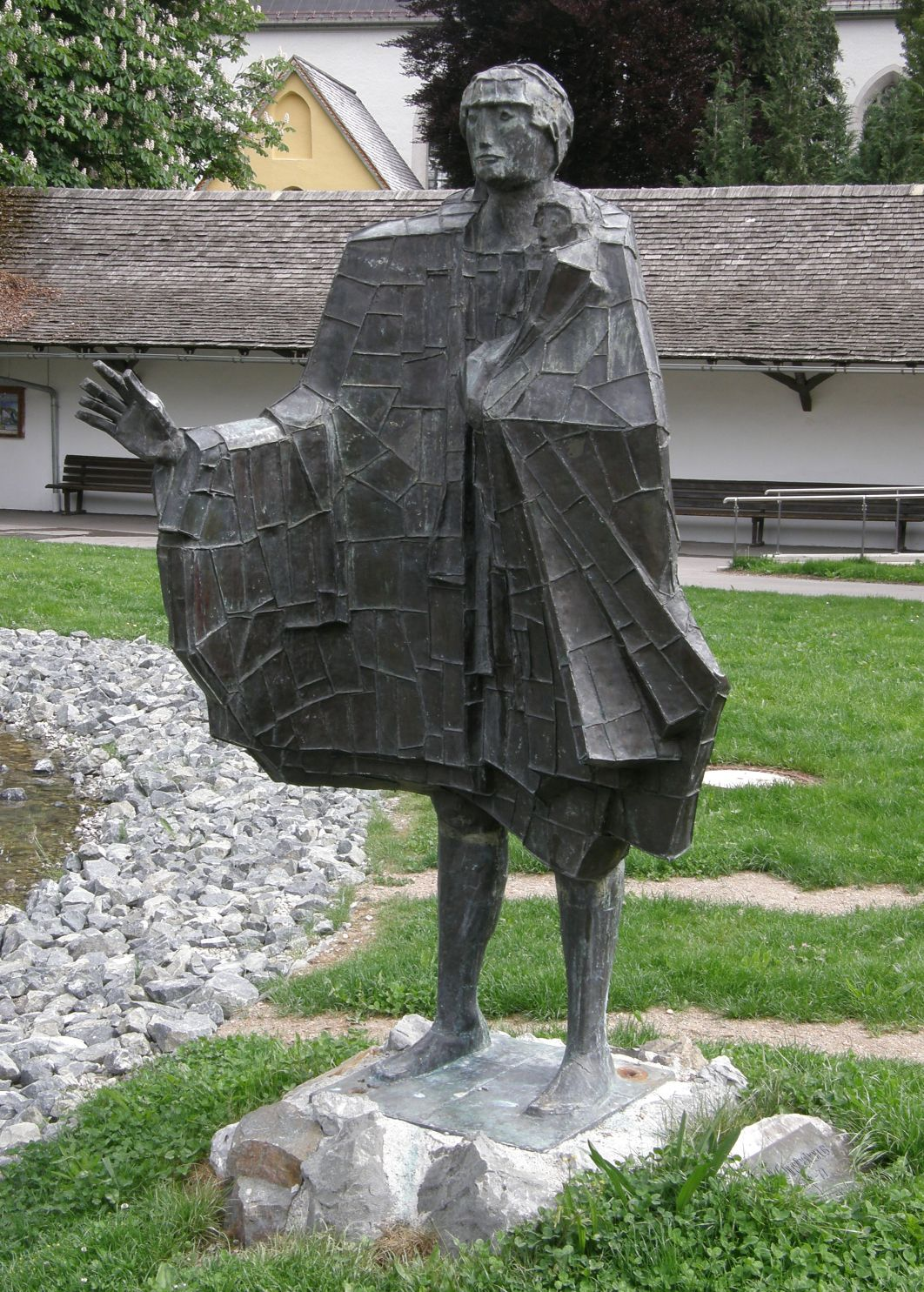 Maximilian Rueß: Hl. Christoporus. 1974-77. Kurpark, Oberstdorf.